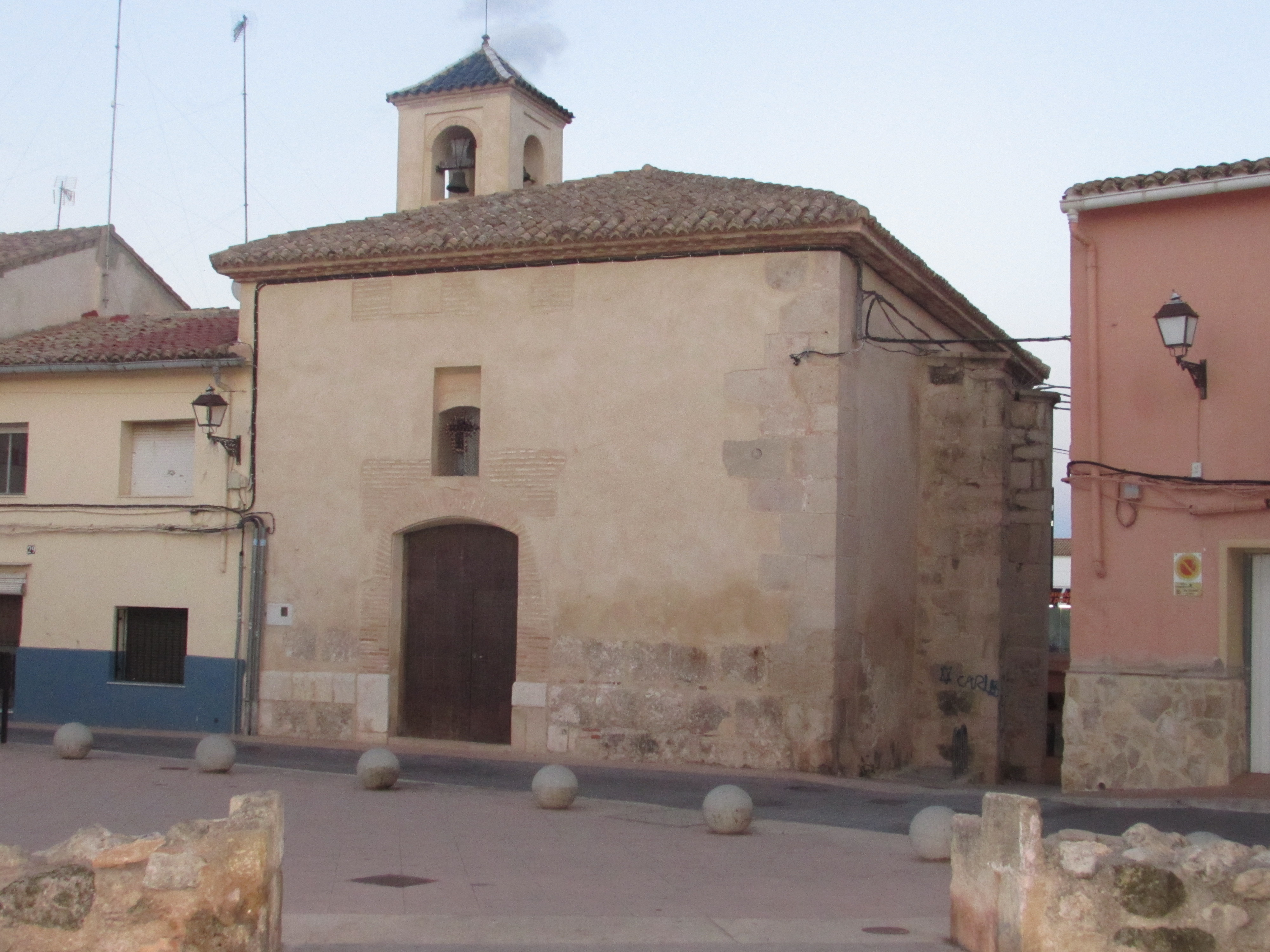 Oratori dels Borgia